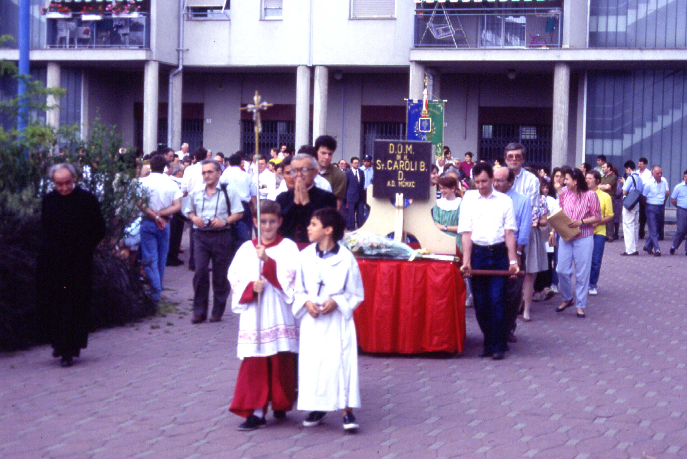 Percorso di avvicinamento della prima pietra al cantiere della chiesa